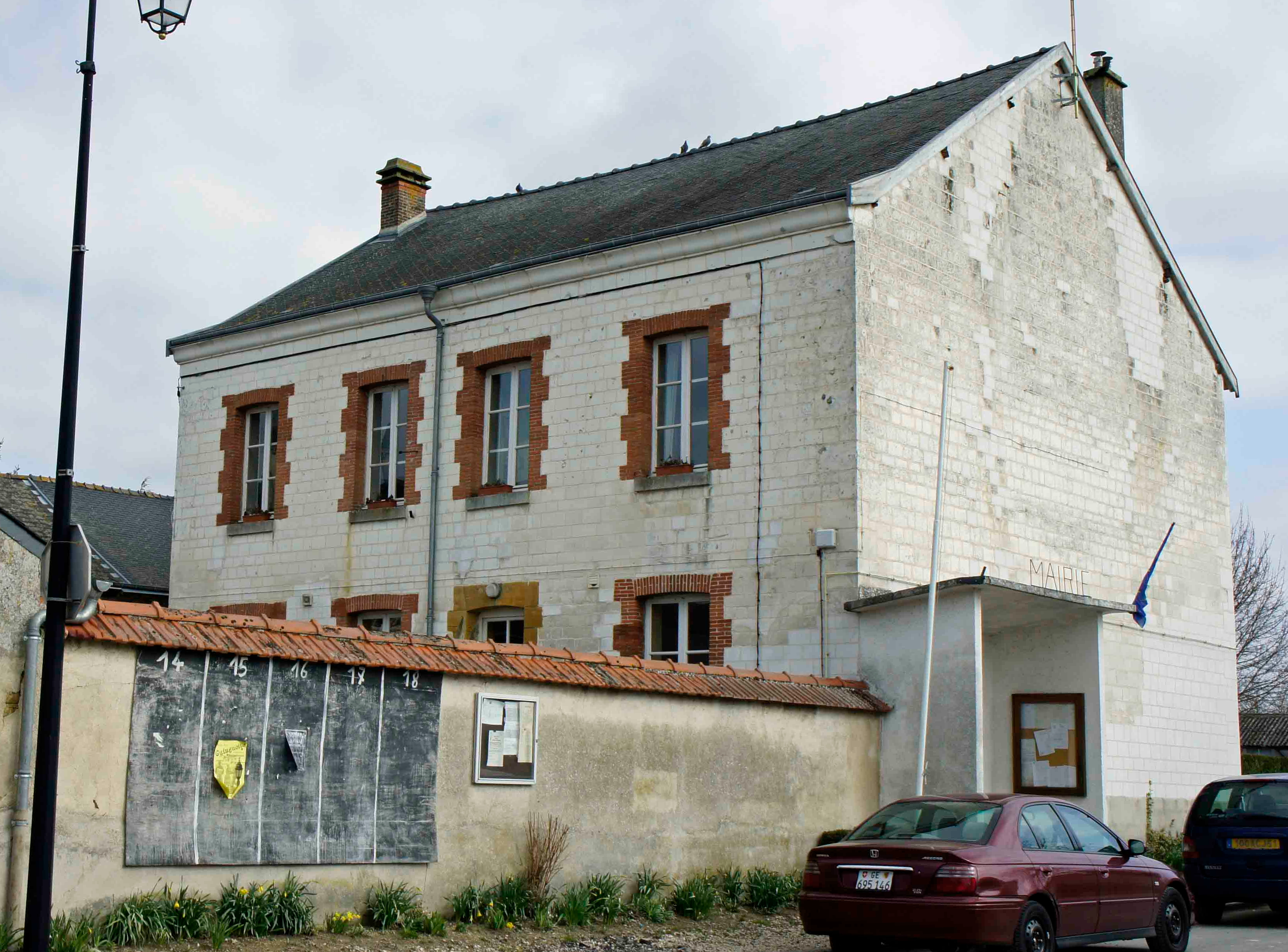 Vue de la Mairie de Roizy.